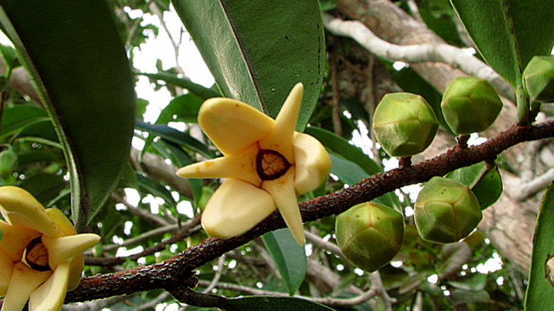 Xylopia laevigata (Mart.) R. E. Fr.